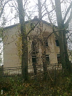 Двухэтажный дом который не работает много лет